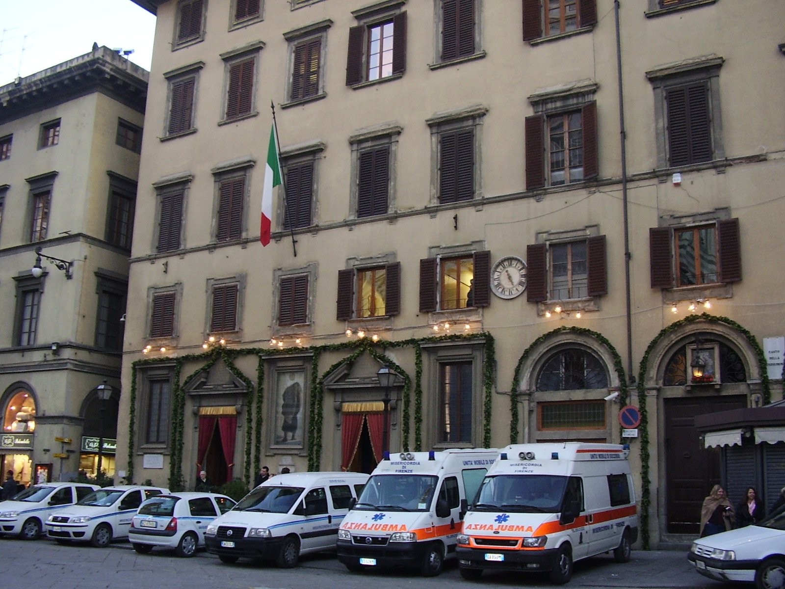 PIcture of the Headquarter of the Misericordia the St. Sebastian Day; the ambulances are ranged alongside. Immagine della Sede dell'Arciconfraternita della Misericordia di Firenze il giorno del suo Patrono, San Sebastiano, con i mezzi di soccorso all'esterno.